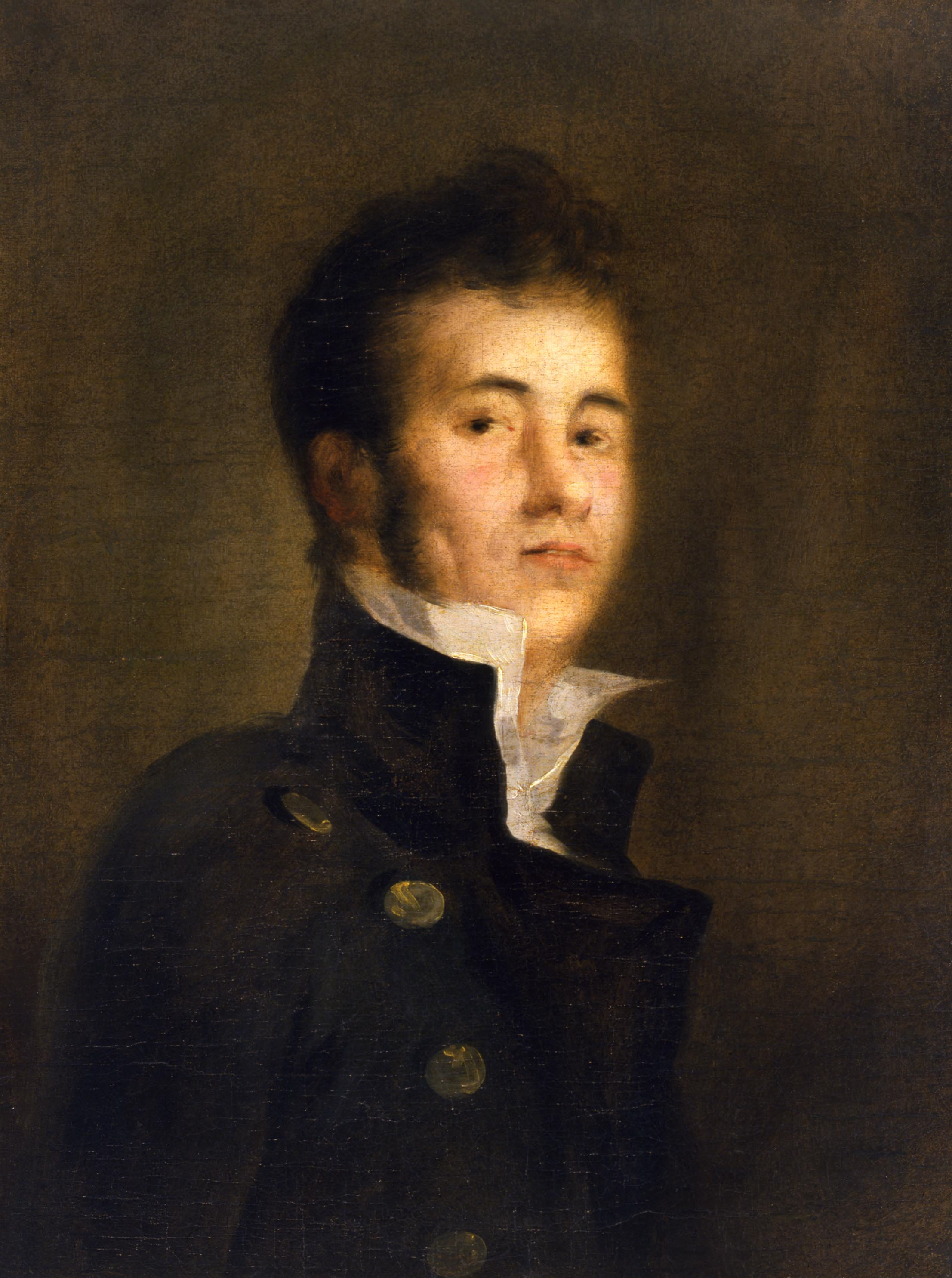 Retrato de Francisco Bellver y Llop, óleo sobre lienzo, 90 x 67 cm, Madrid, Real Academia de Bellas Artes de San Fernando